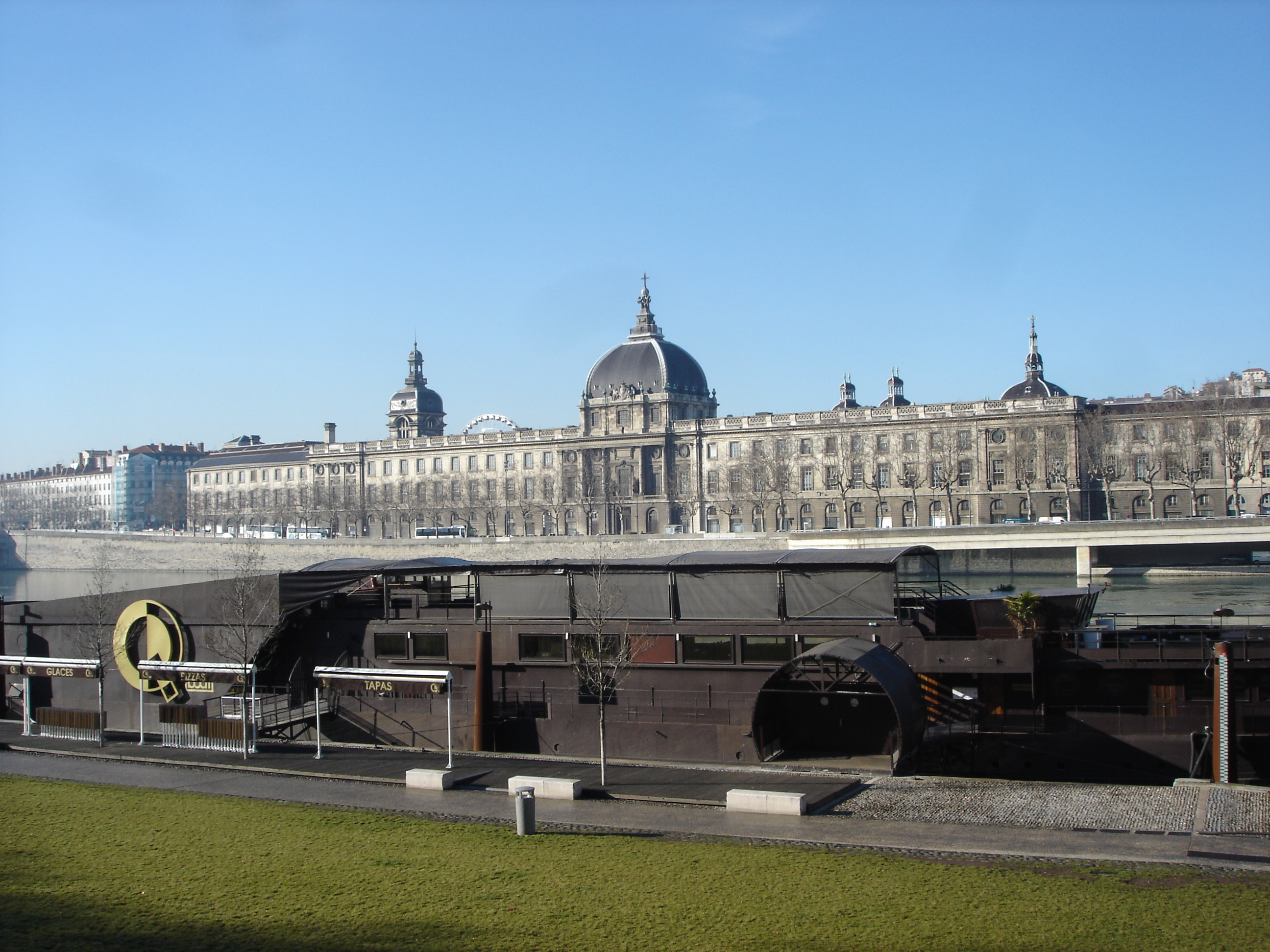 L'Hôtel-Dieu de Lyon depuis les berges du Rhône